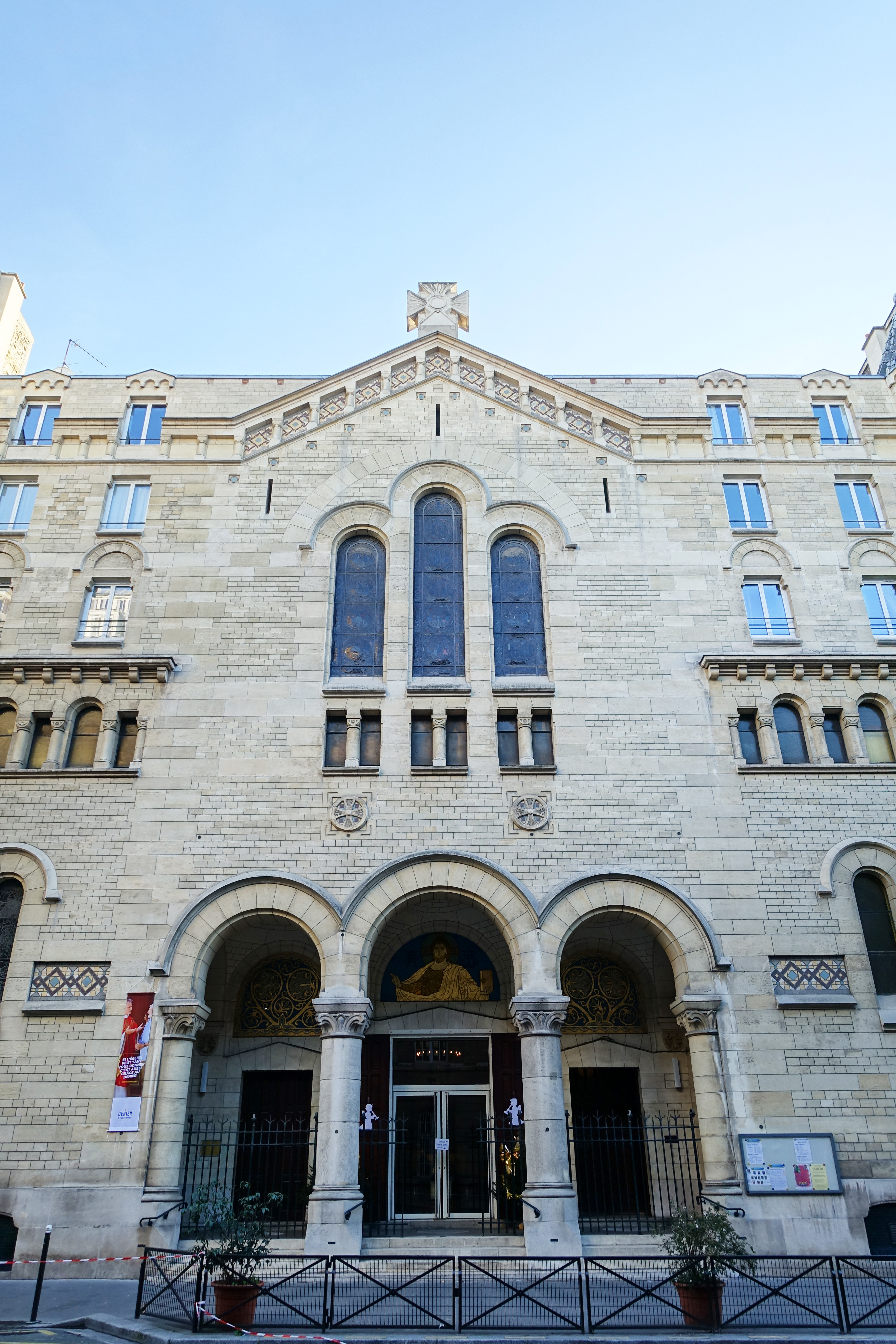 Église Saint François de Sales (rue Ampère) @ Paris 17 Église Saint-François-de-Sales, 15-17 Rue Ampère, 75017 Paris, France.